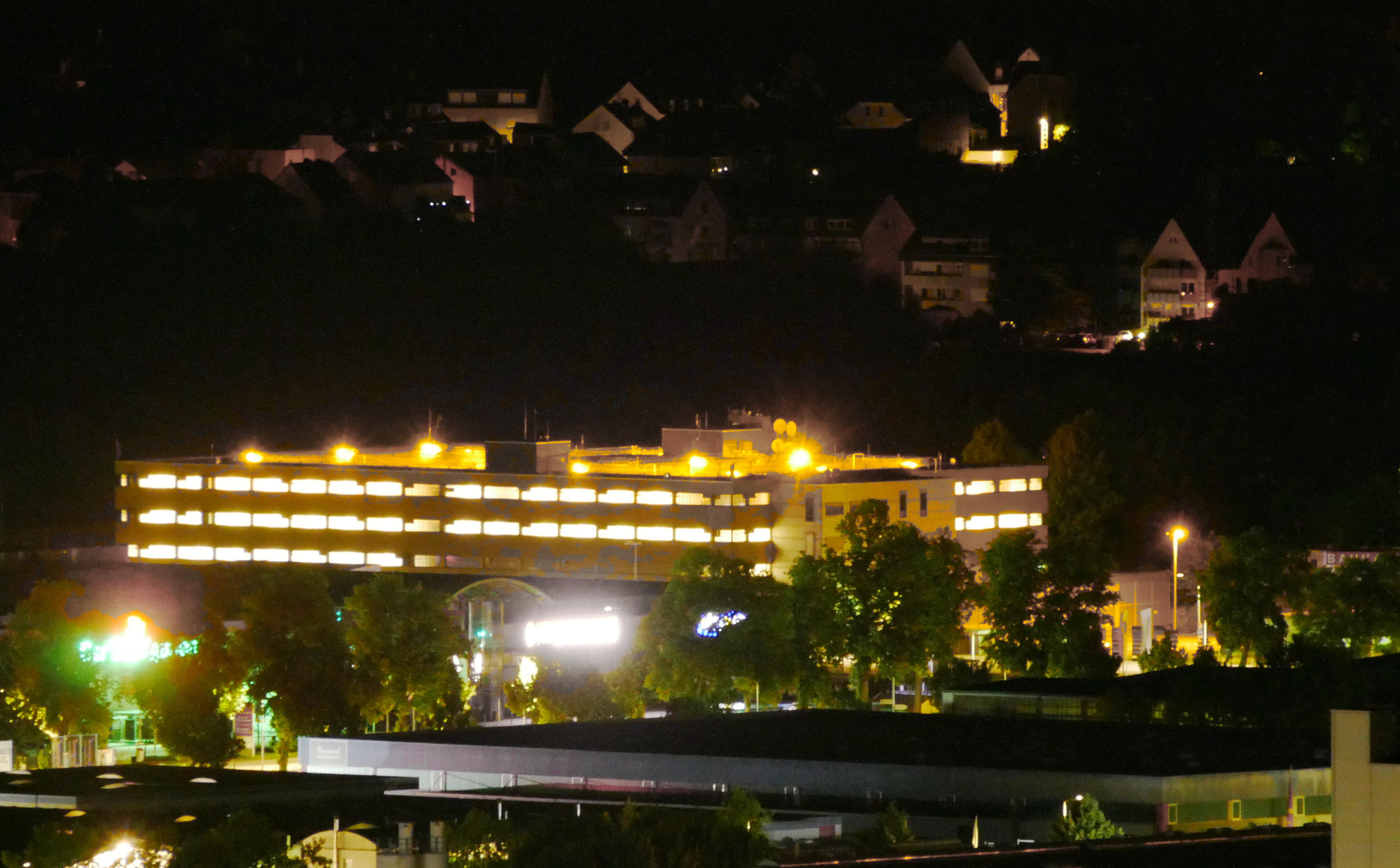 Justizvollzugsanstalt Trier, nachts - Vom Weg vom Loellberg zum Roscheiderhof aus aufgenommen. KEIN Drohnenfoto.